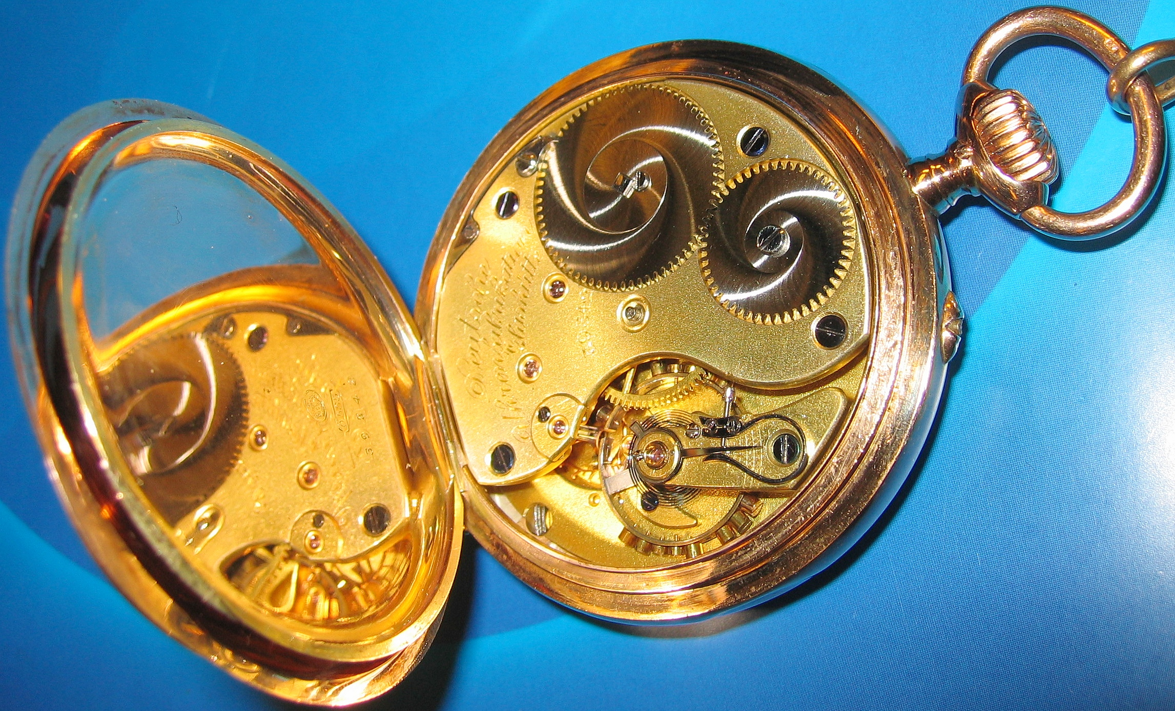 Taschenuhr A.Lange & Söhne, selbst photographiert 2005 Johann H. Addicks